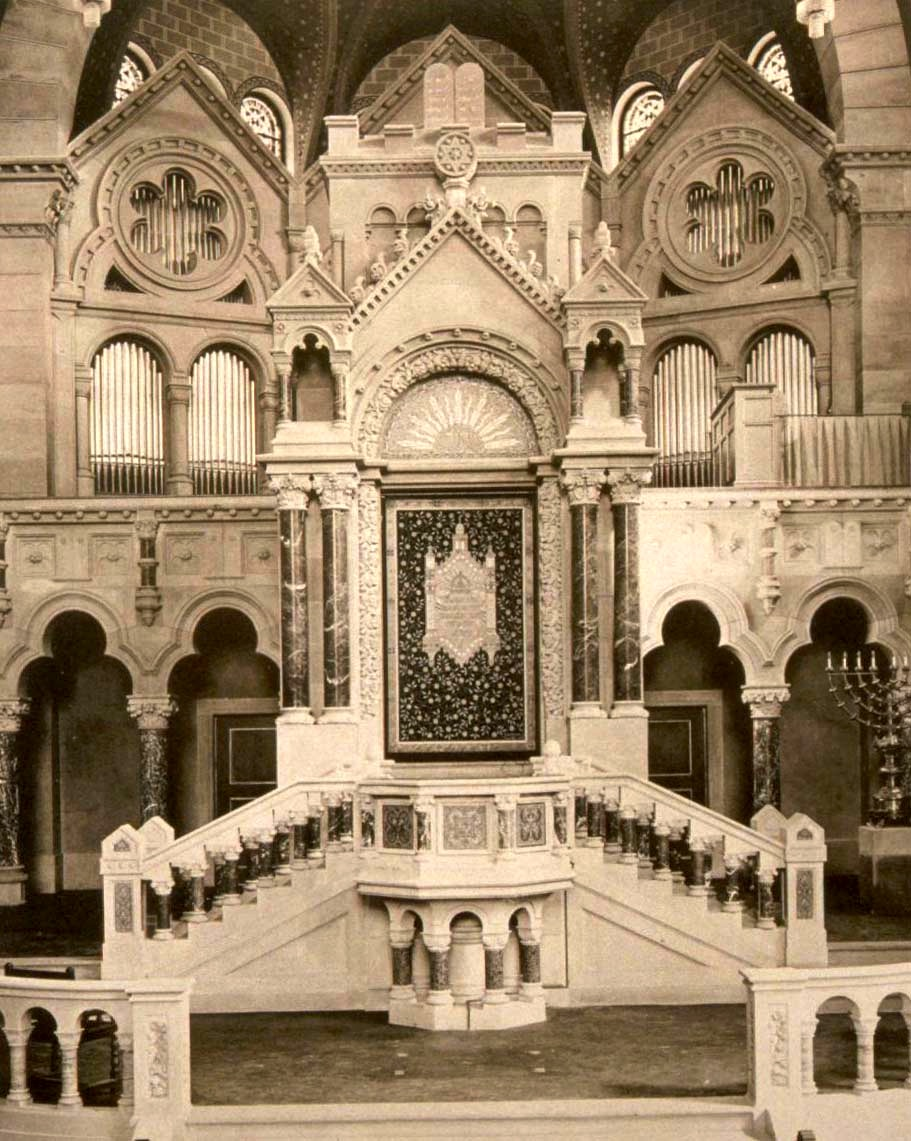 Strasbourg synagogue quai Kléber arche sainte 1898-1940. Le facteur d’orgue E. A. Roethinger de Strasbourg construira les grandes orgues qui comptent soixante-deux jeux, trois claviers à cinquante-six touches et un pédalier à trente-deux marches.